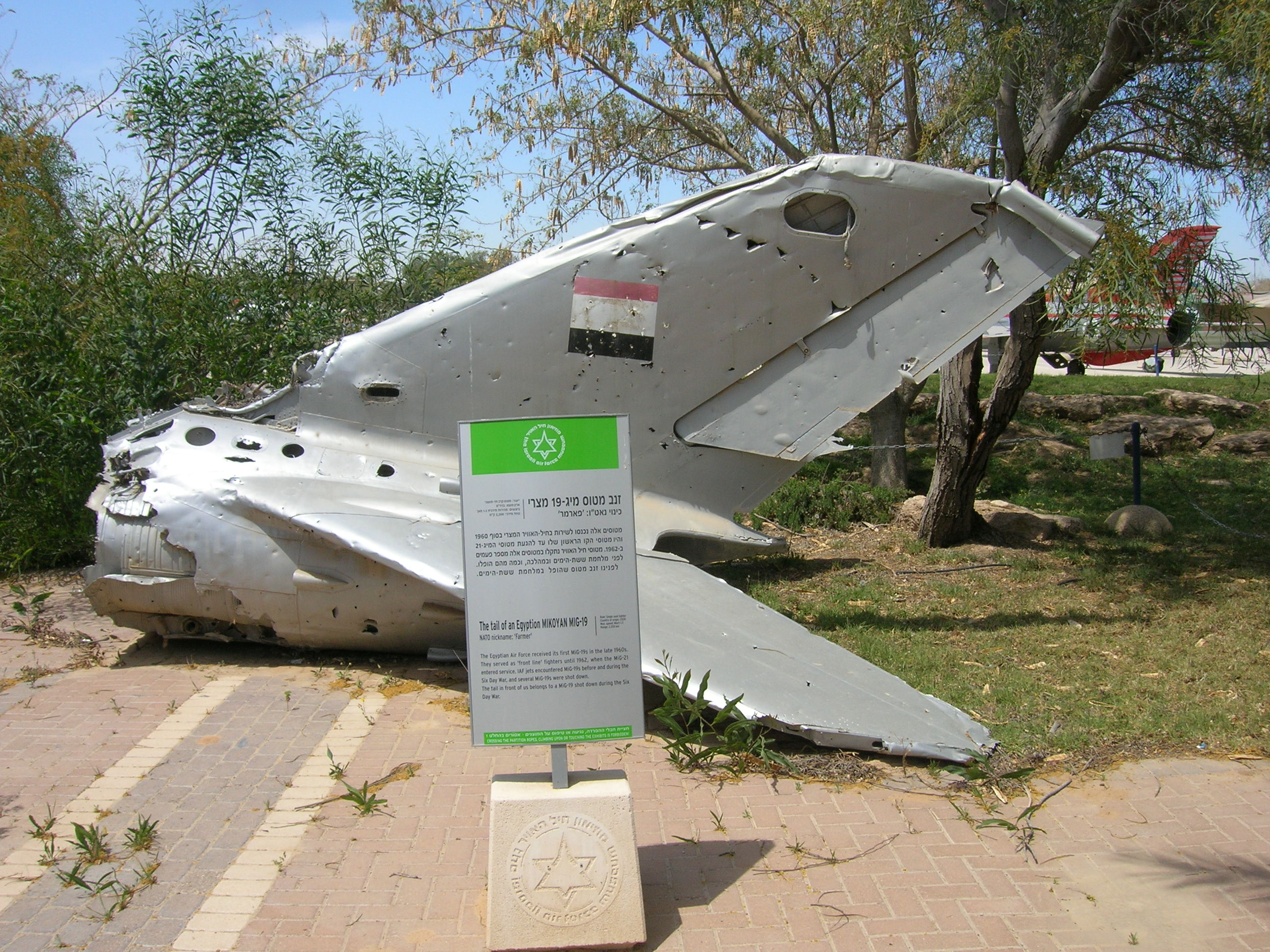 i042107 219